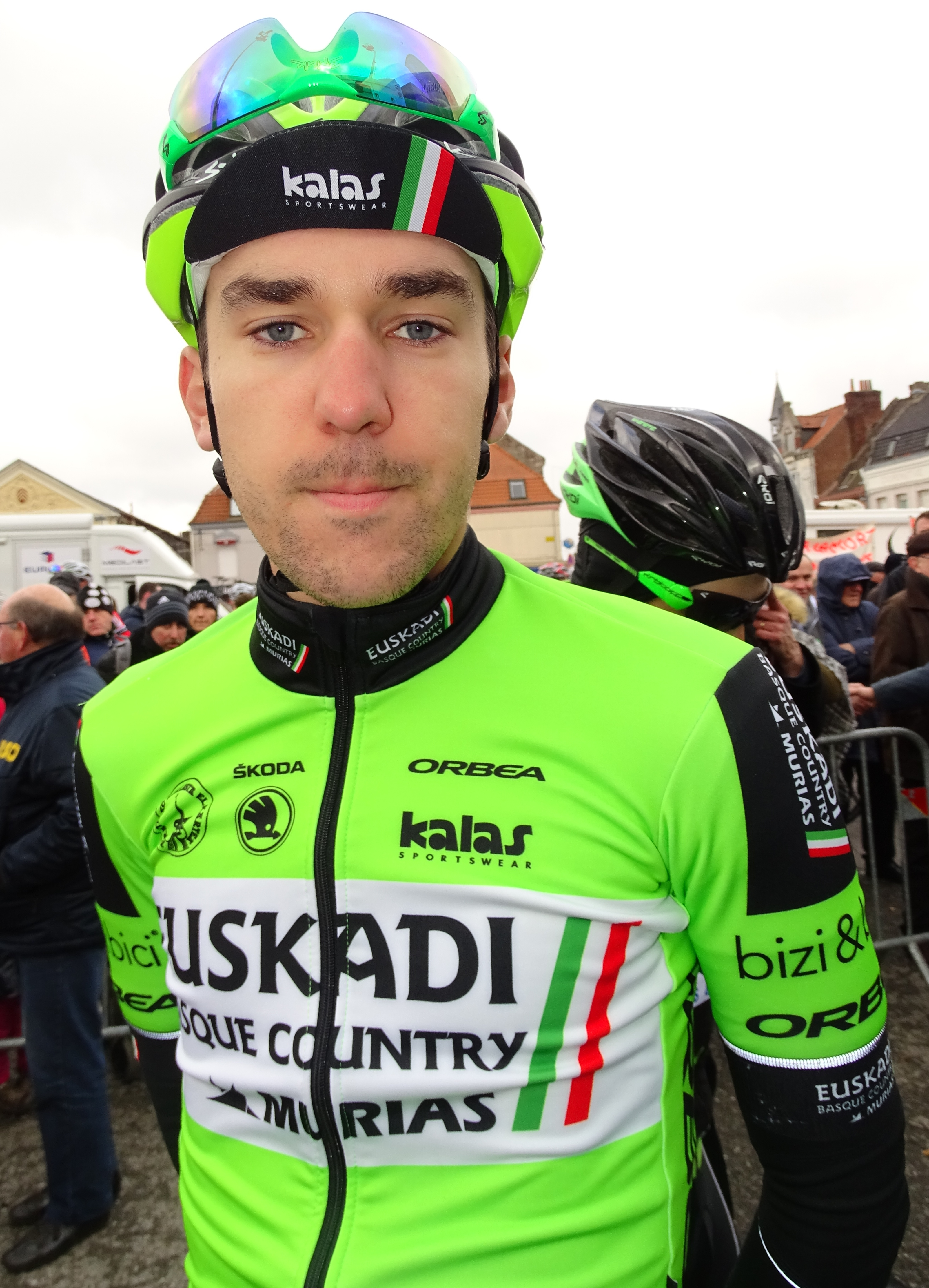 Reportage réalisé le dimanche 6 mars à l'occasion du départ et de l'arrivée du Grand Prix de Lillers-Souvenir Bruno Comini 2016 à Lillers, Pas-de-Calais, Nord-Pas-de-Calais, France.